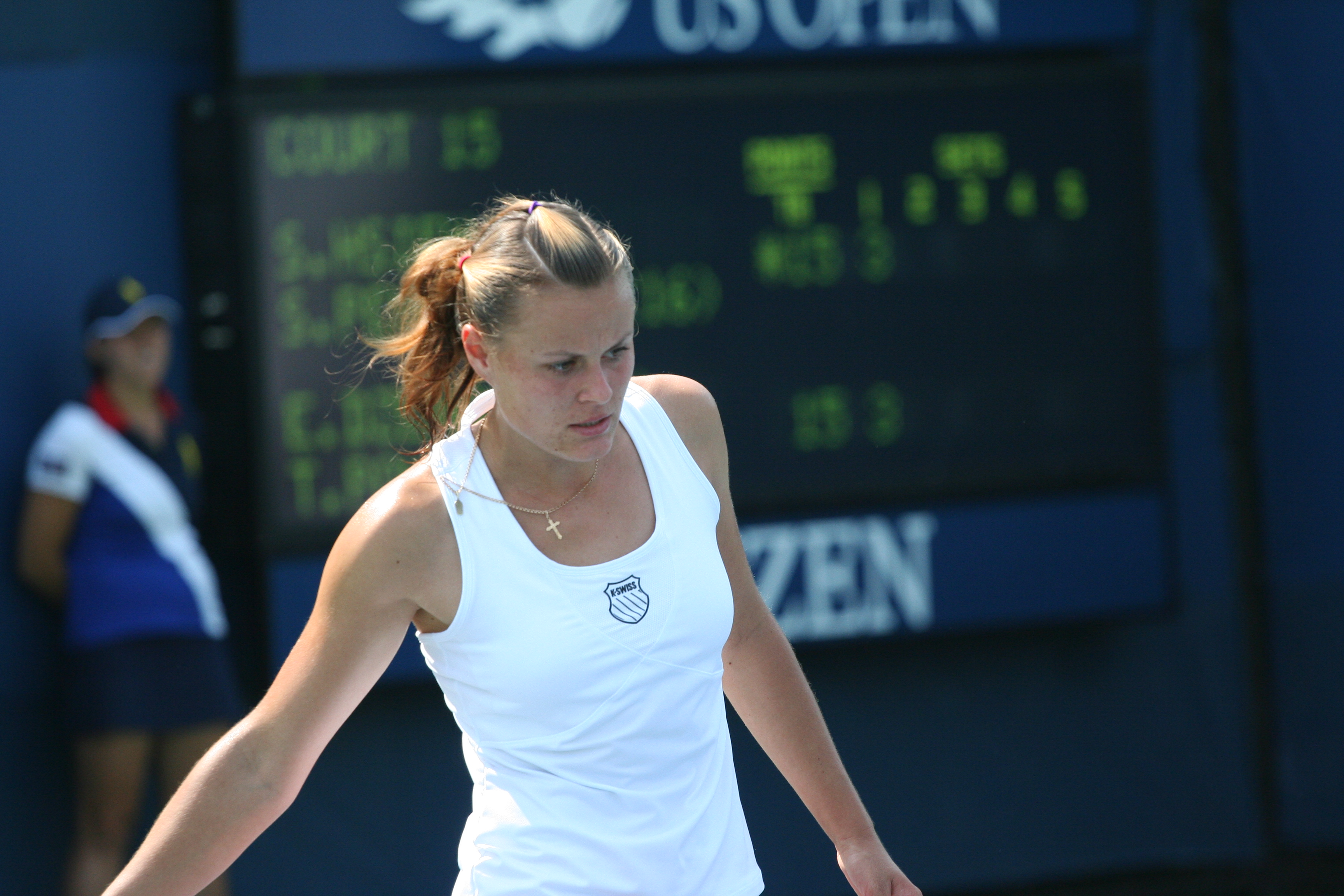 U.S. Open Sept. 1, 2010